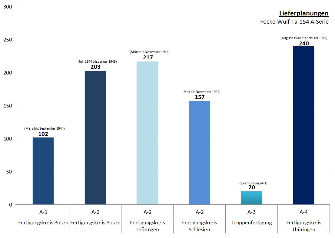 Planungsprogramm der Ta 154 A-Serie